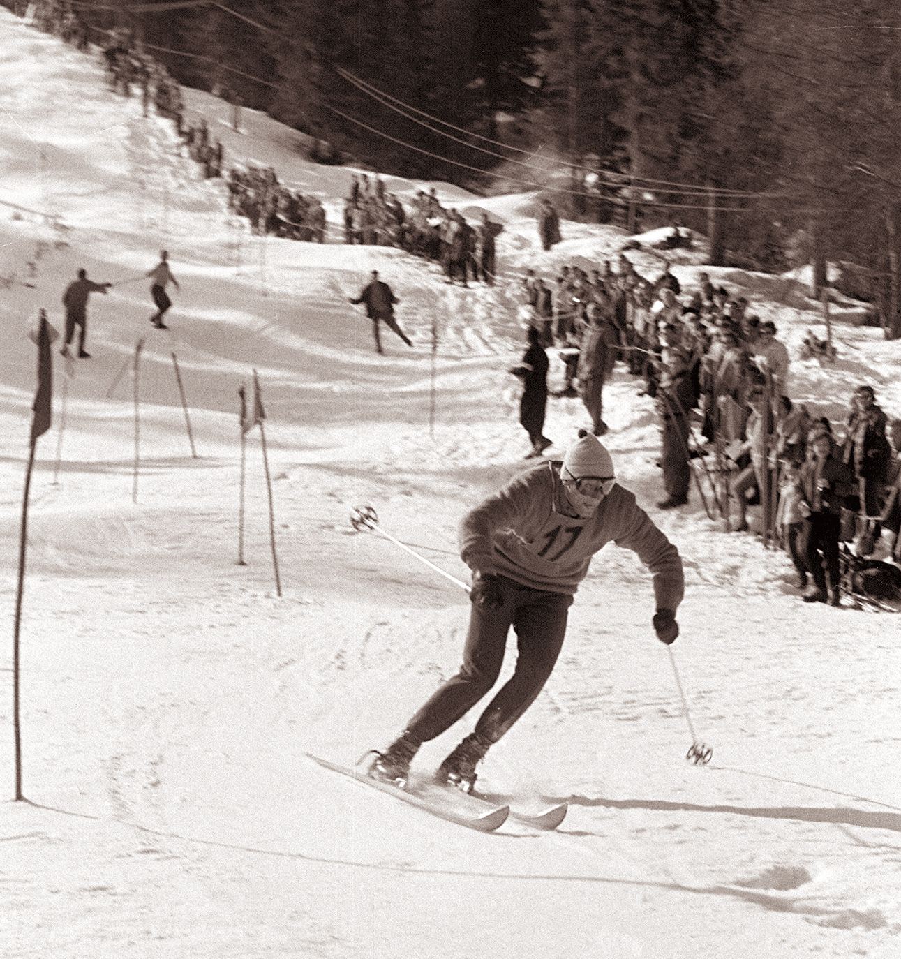 Prvi Pokal Vitranc v Kranjski Gori